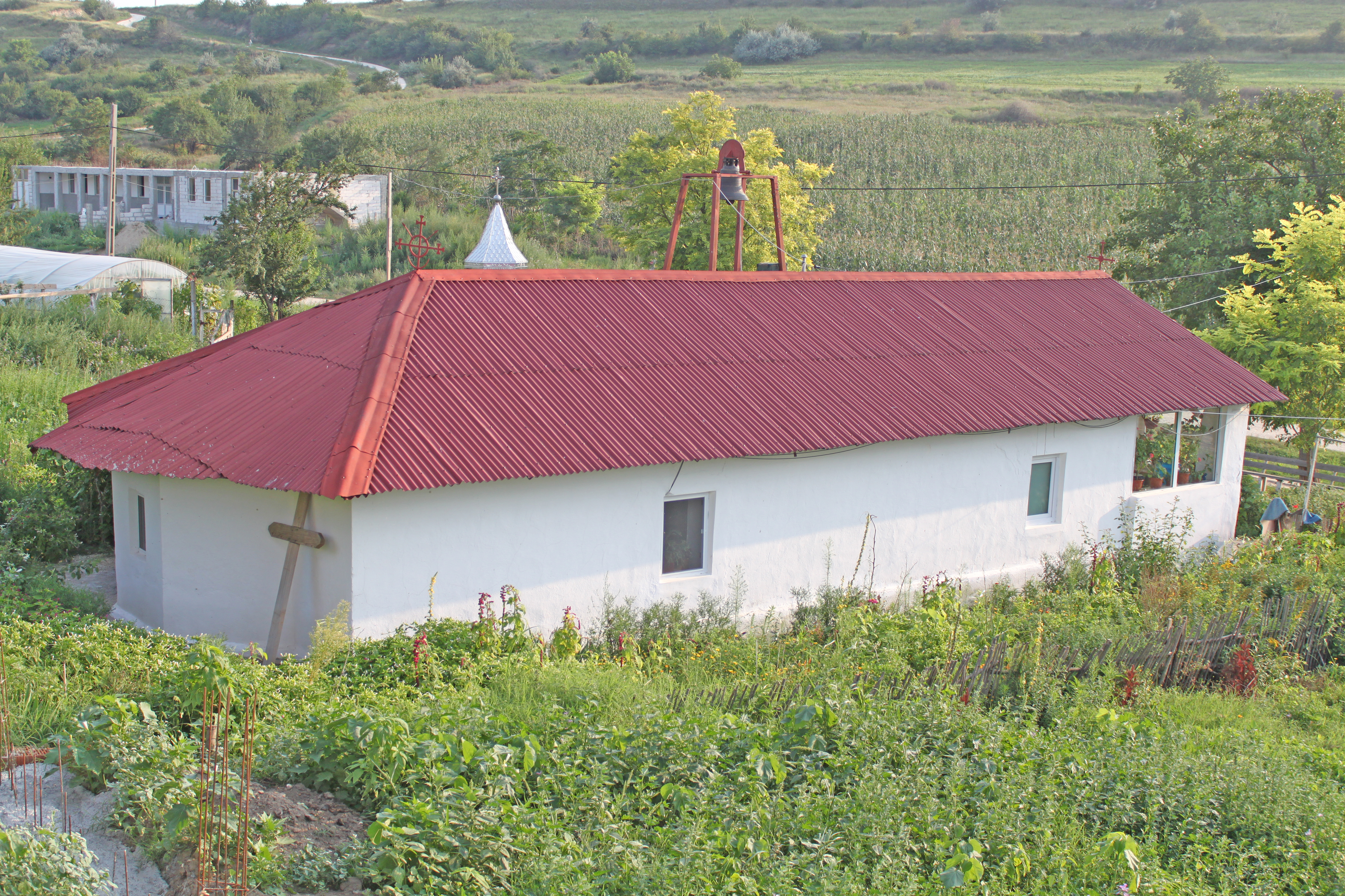 Biserica de lemn din Strunga, judeţul Constanţa.